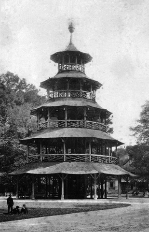 München, Chinesischer Turm im Englischen Garten